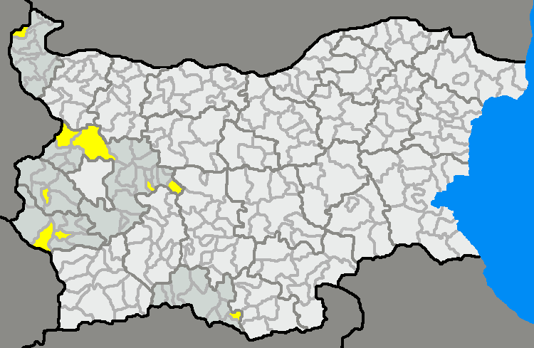 Български общини с над 99 % българско население (2001)